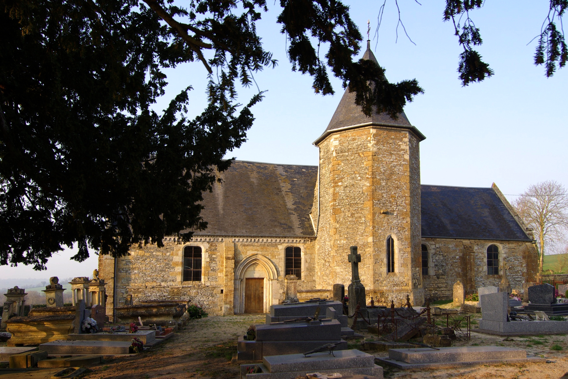 L'église de Montigny, Calvados.